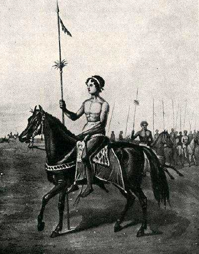 Dibujo que representa guerreros mapuches a caballo.